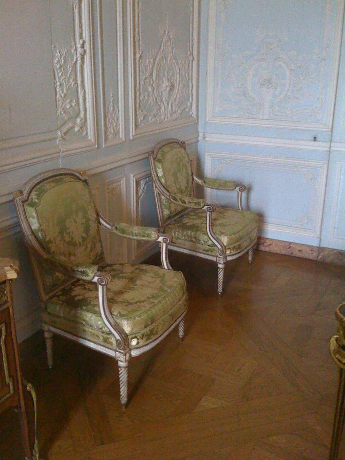 Jean-Baptiste-Claude Sené (1748-1803), fauteuil cabriolet (v. 1785), château de Versailles.